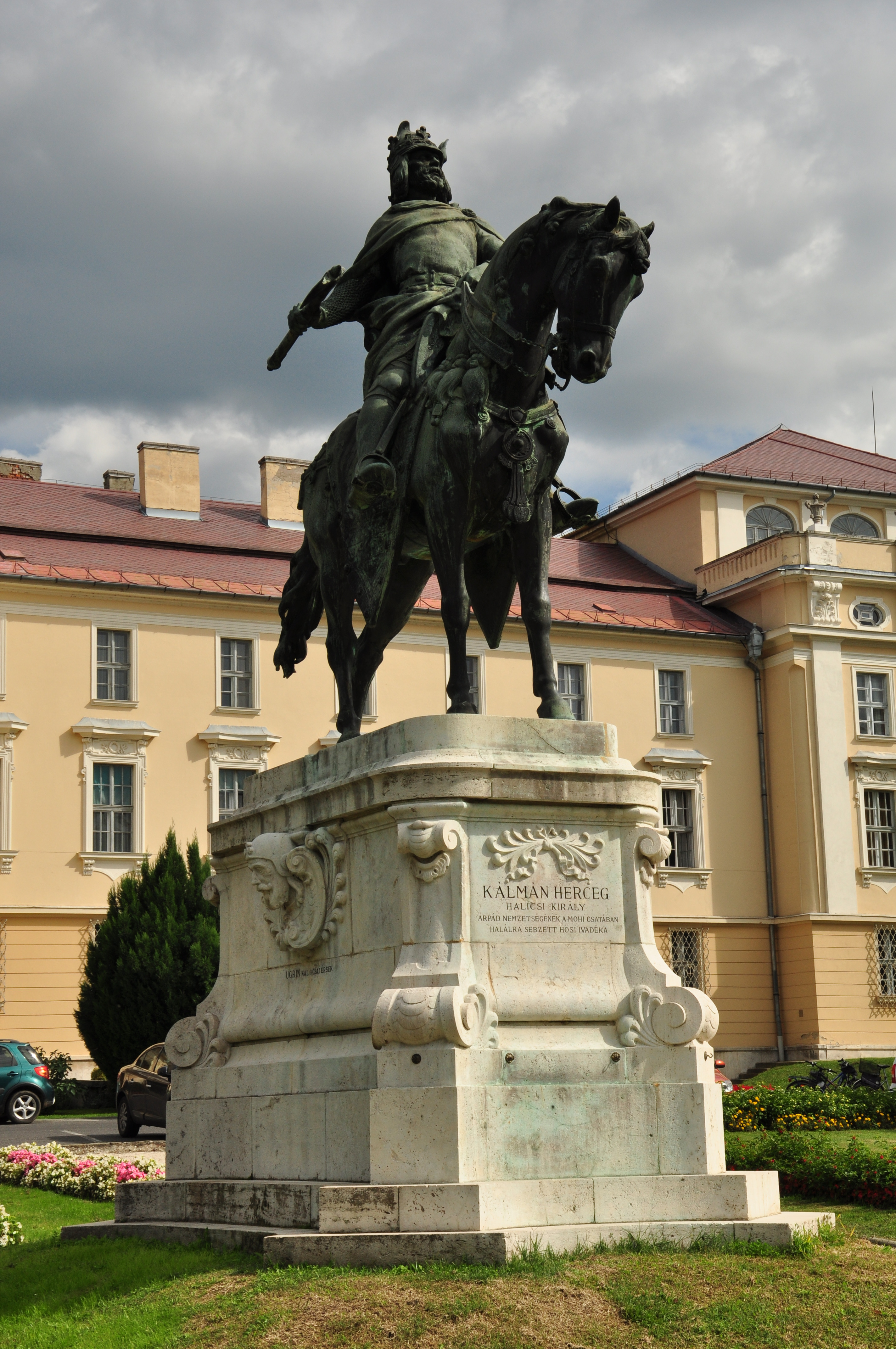 Kálmán herceg lovas szobra This is a photo of a monument in Hungary. Identifier: 15408